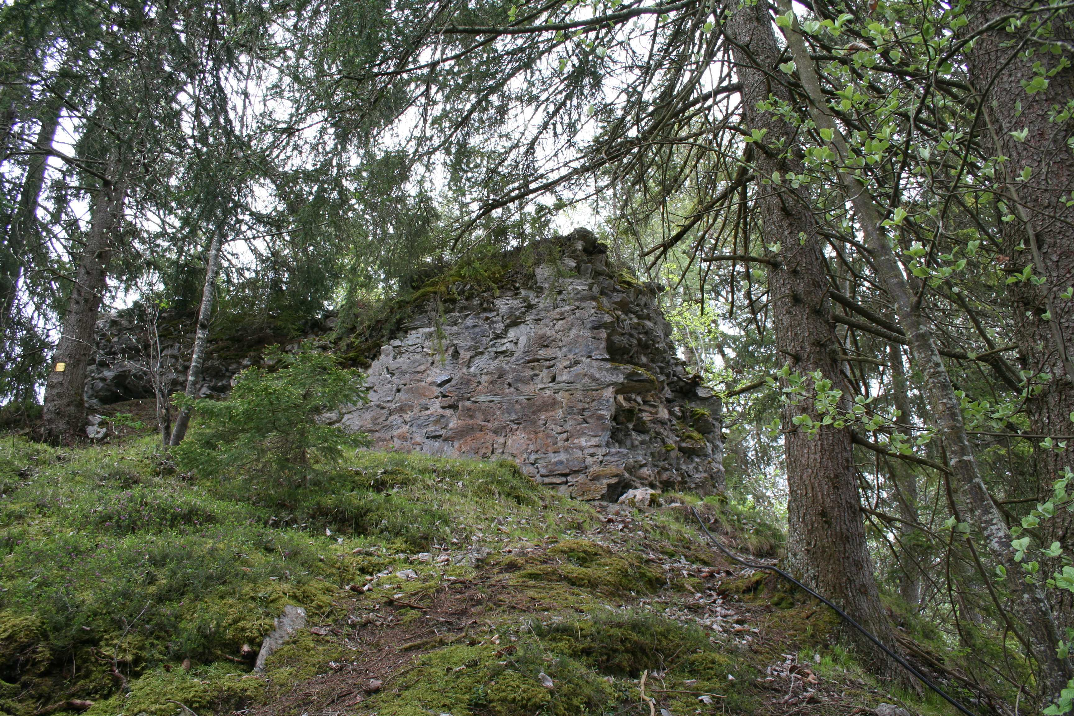 Turmwand auf der Nordseite